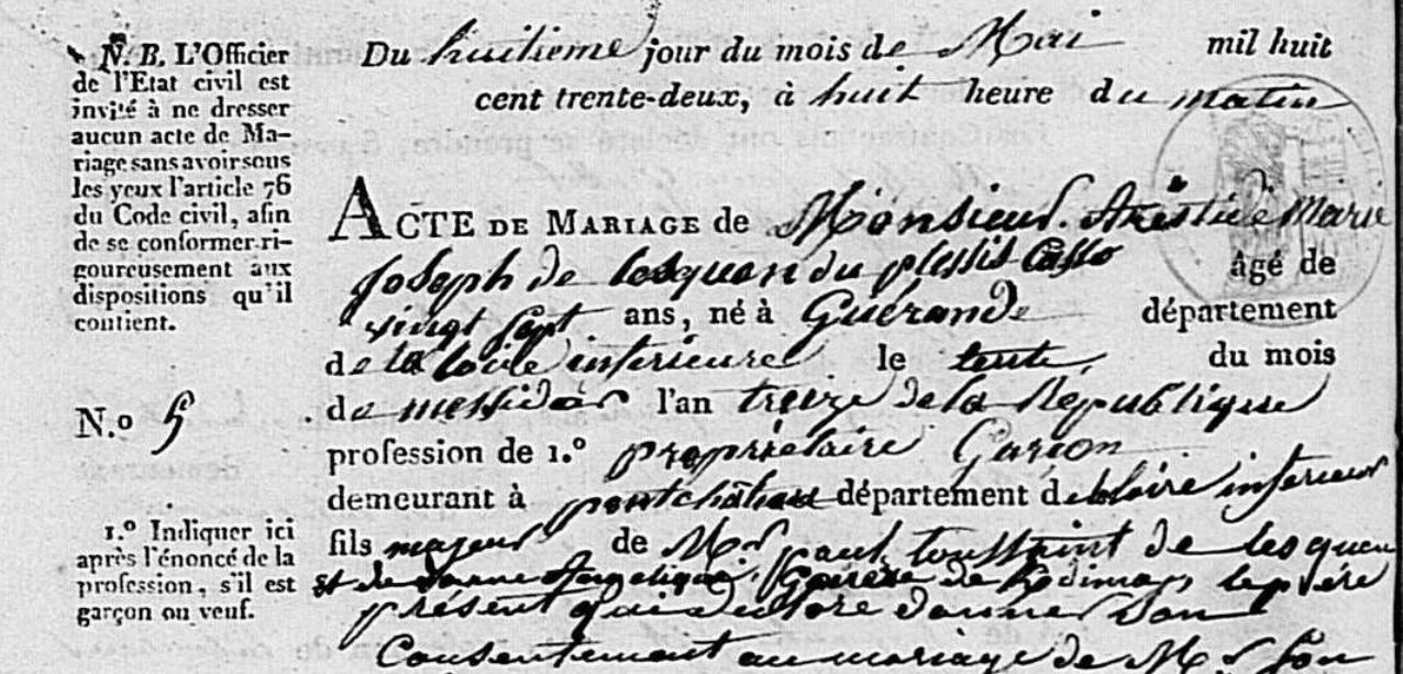 Acte de mariage d'Aristide Marie Joseph de Lesquen du Plessis-Casso